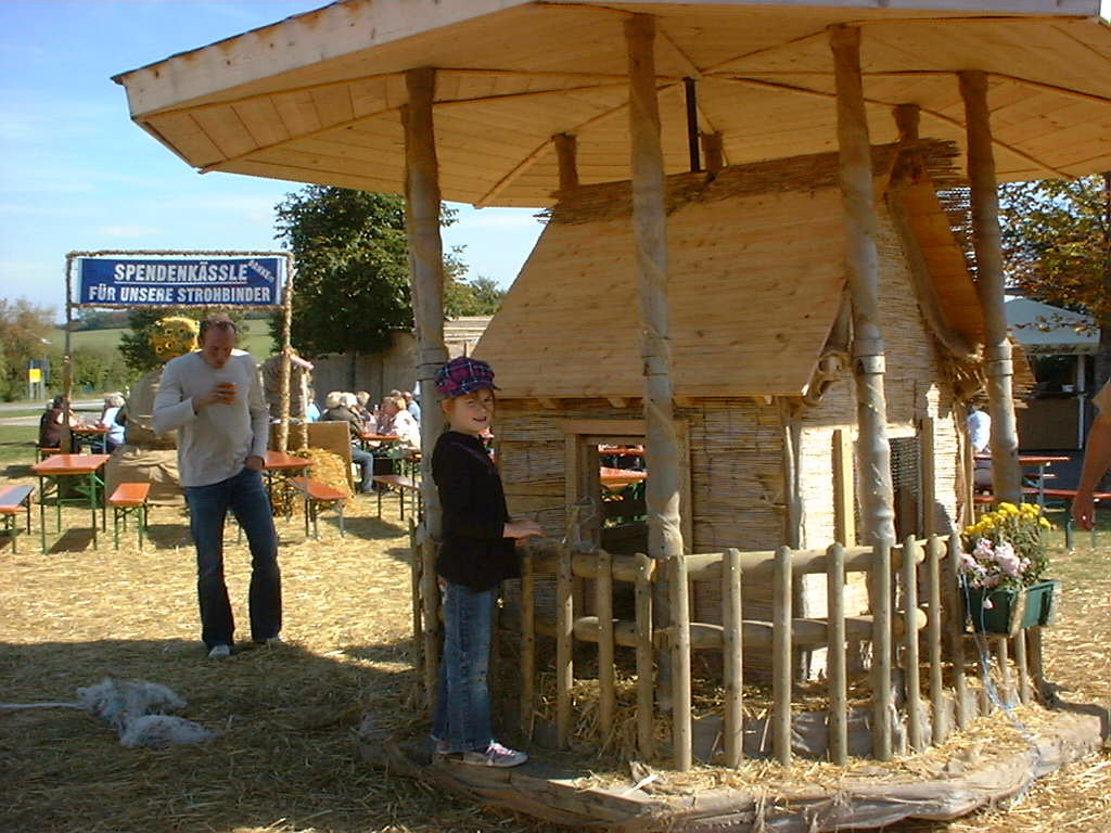 Objekt im Strohpark